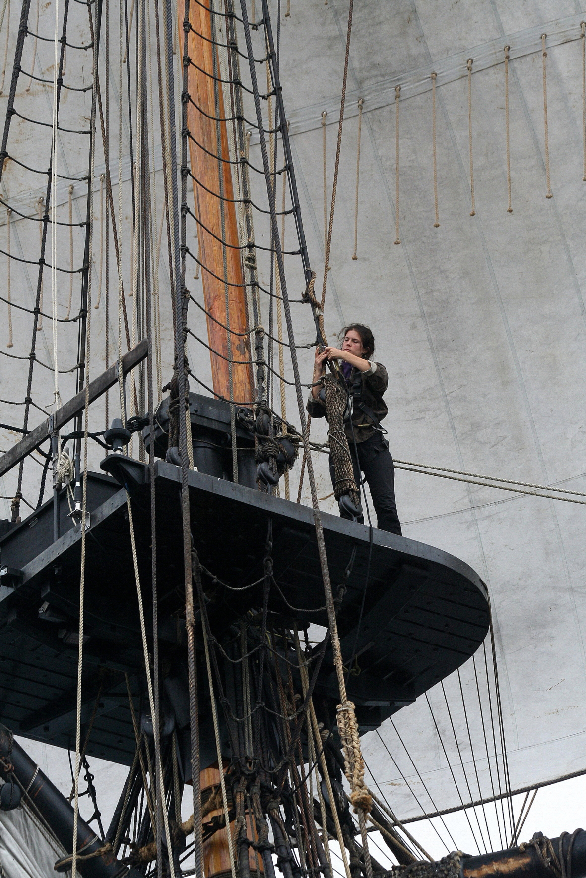 L'Hermione arrive à Brest le 10 août 2015 : dans les huniers